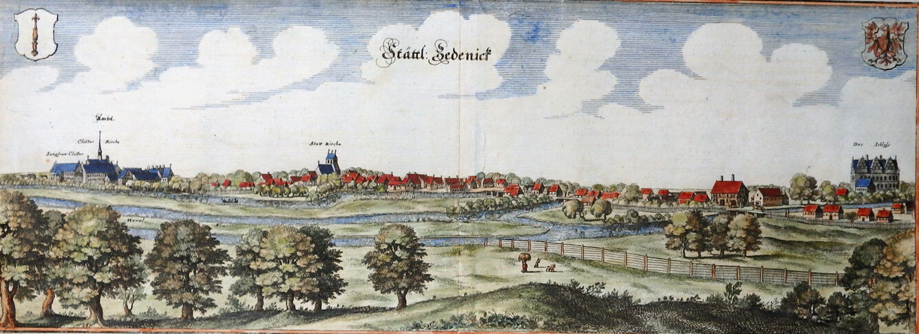 Mark Brandenburg, Zehdenick, Merian Topographia, Kolorierter Kupferstich